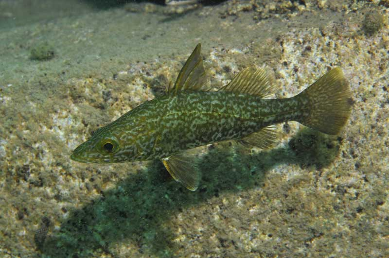 Lates angustifrons photographié à Bulu point en Tanzanie.